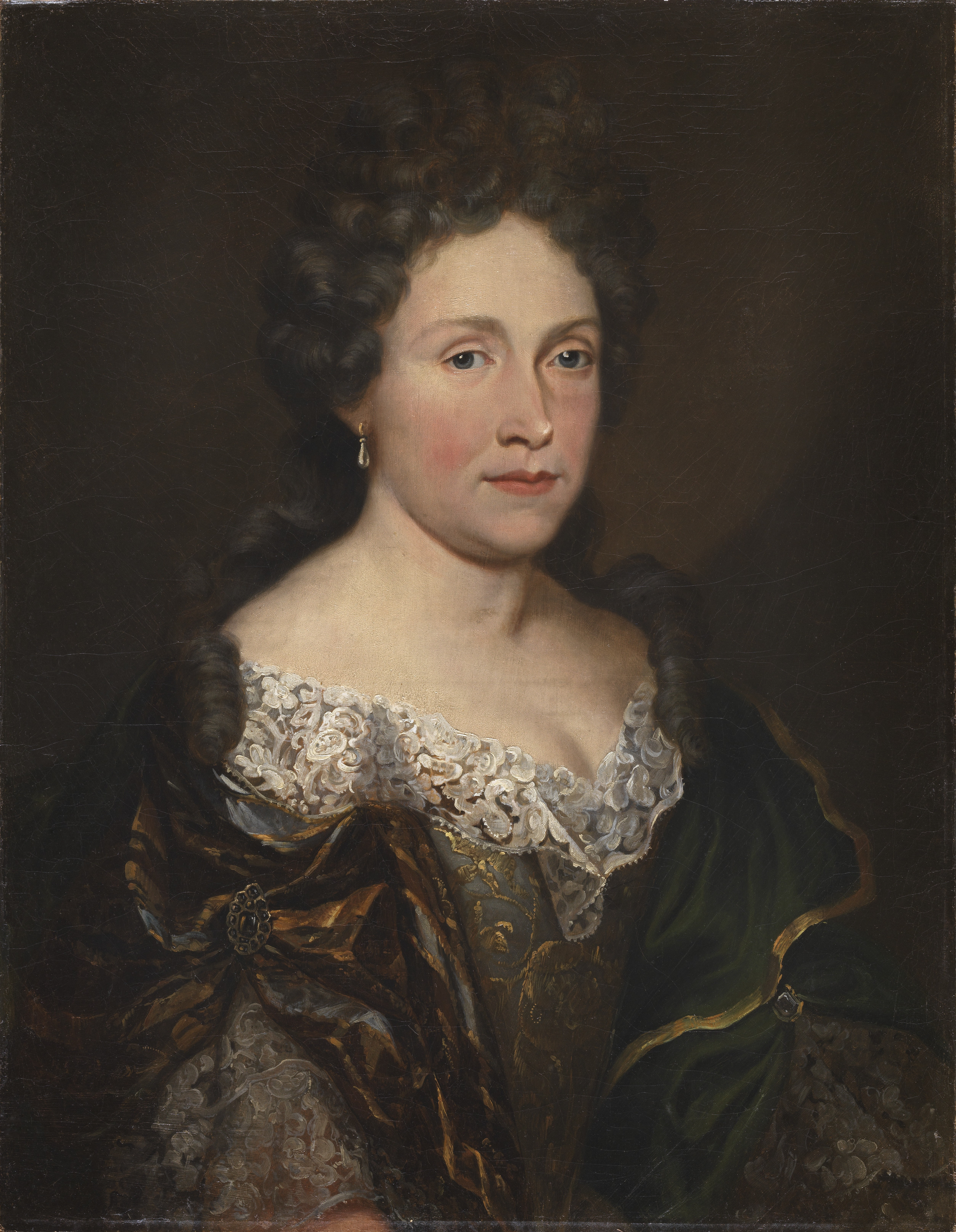 schilderij ( Museum Plantin-Moretus